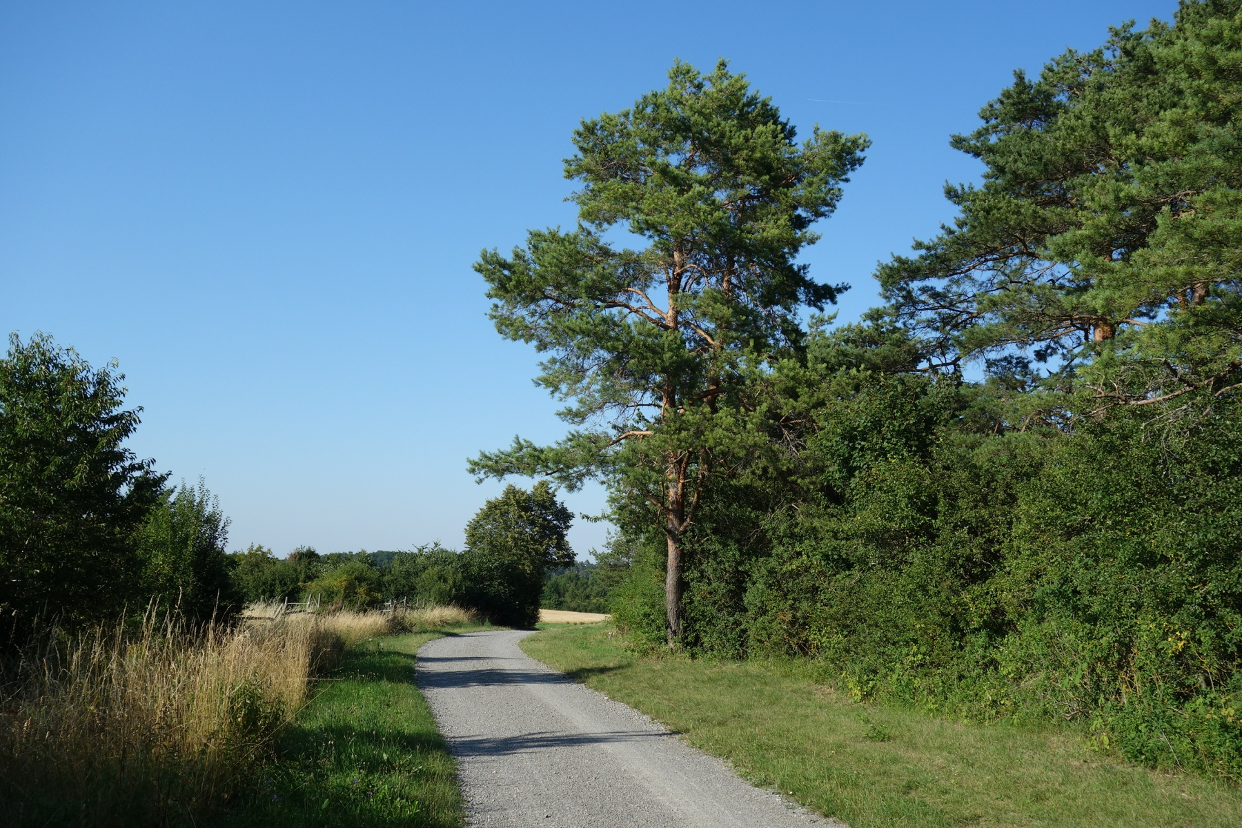 Partie am Veigelesweg Richtung Möttlingen, Juli 2019: der Veigelesweg ist Teil des Gäurandwegs